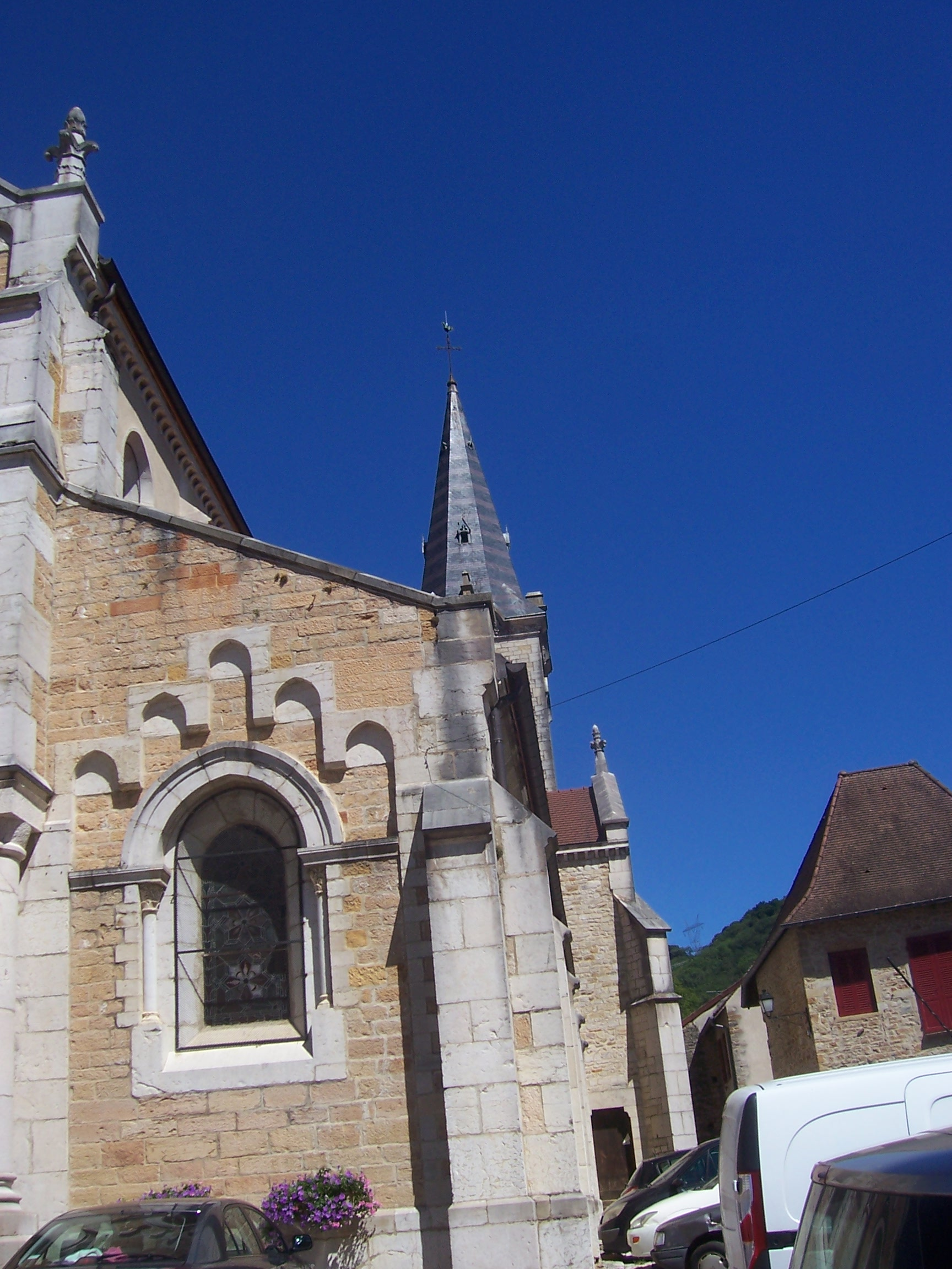 Flèche de l'eglise de Cuiseaux